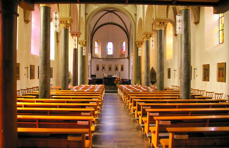 Kath. Kirche St. Agnes, Angermund, innenansicht